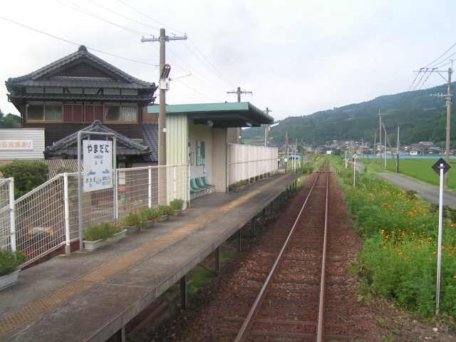 山谷駅 投稿者が撮影(2006/08/28)